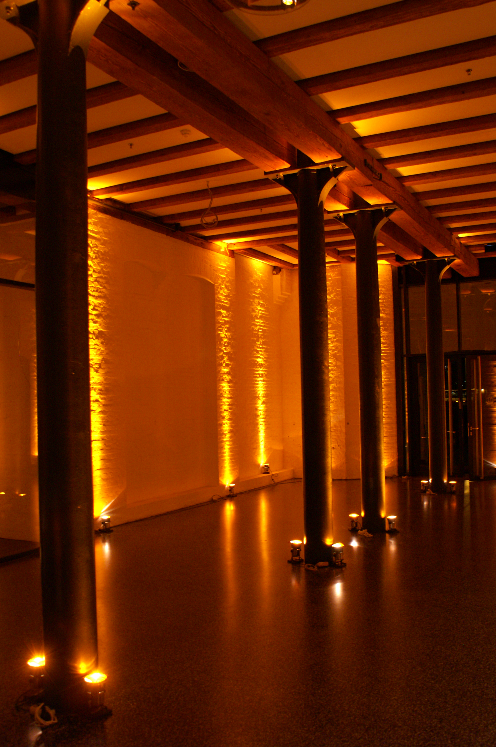 Internationales Maritimes Museum in Hamburg im Kaispeicher B, Innenraum des Museums vor der Eröffnung